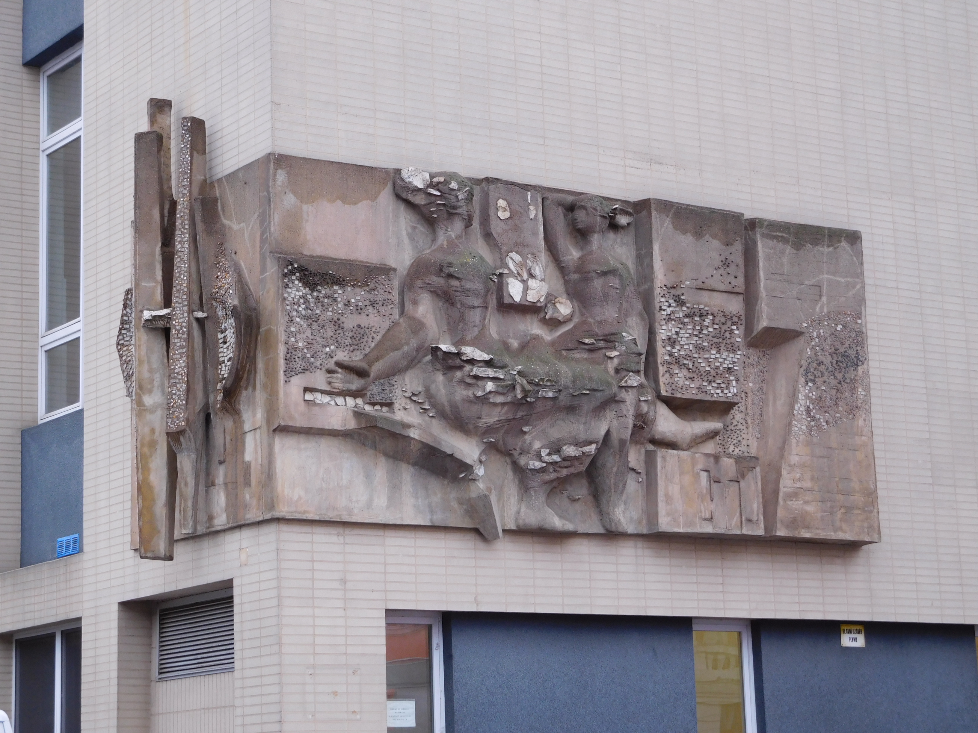 Praha - Letná, Gymnázium Nad Štolou, Reliéf Země a Slunce (Valerián Karoušek, 1964)